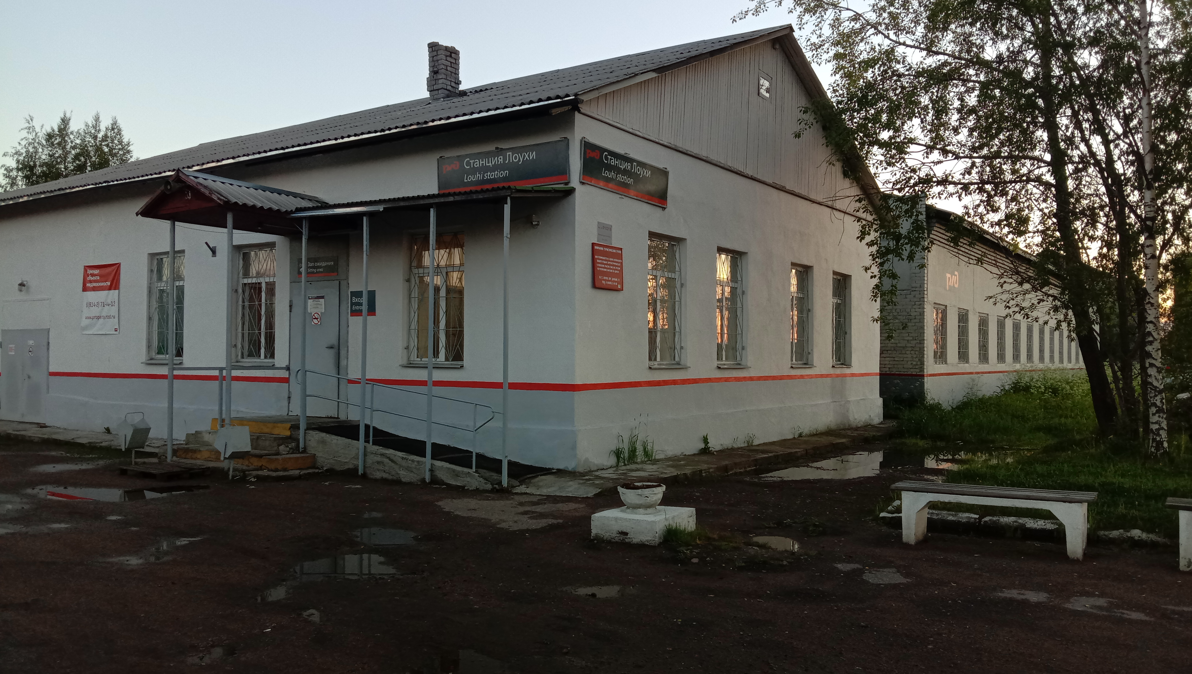 Лоухи